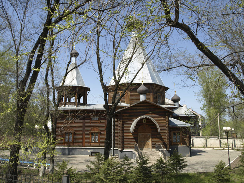 Никольский_храм_в_Биробиджане